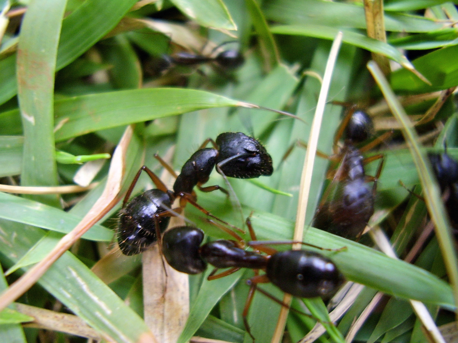 Ants